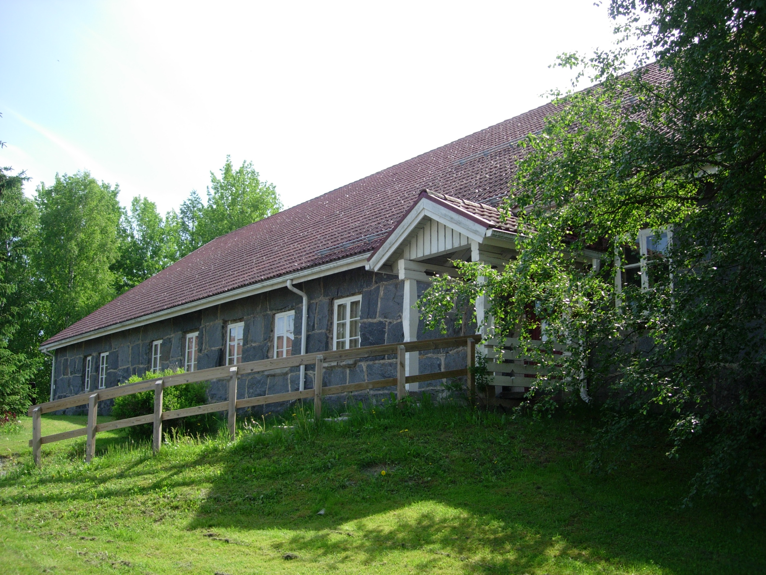 Tyrvään seudun museo, Jaatsinkatu 2